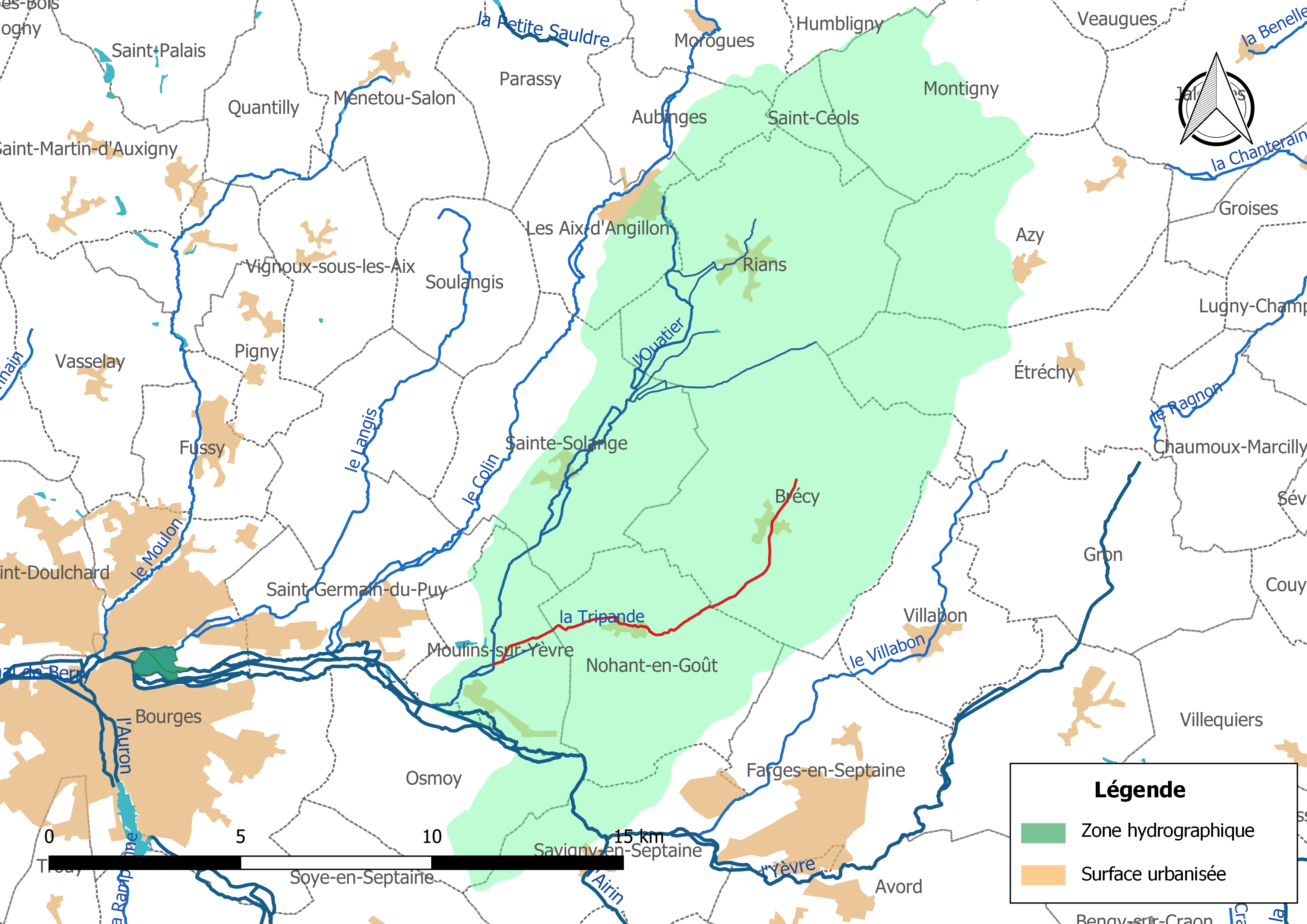 Carte du cours d'eau « la Tripande » (France) et de la zone hydrographique dans laquelle il s'insère.